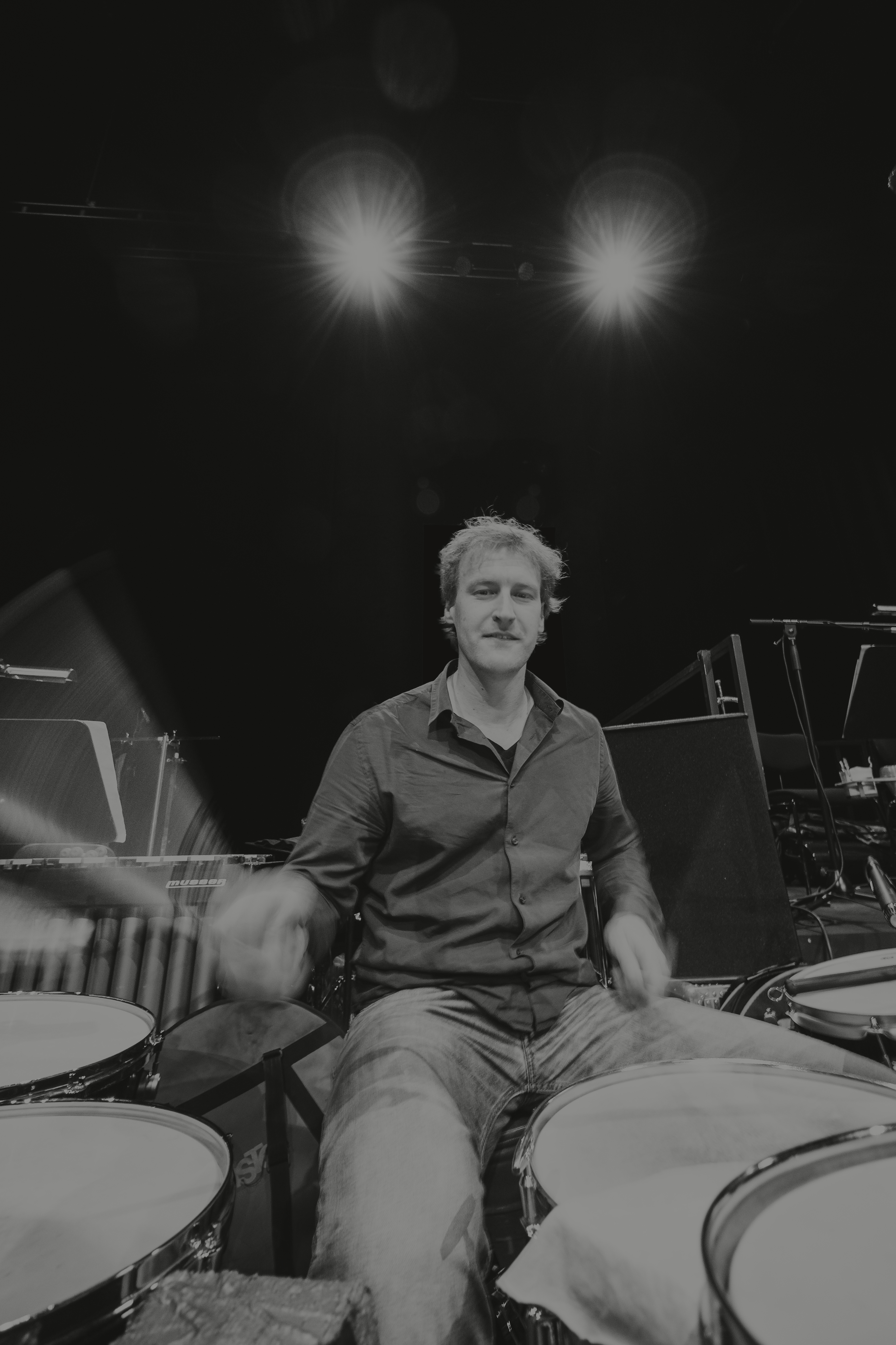 Jean Paul Höchstädter tour 2014 (Foto Oli Leicht